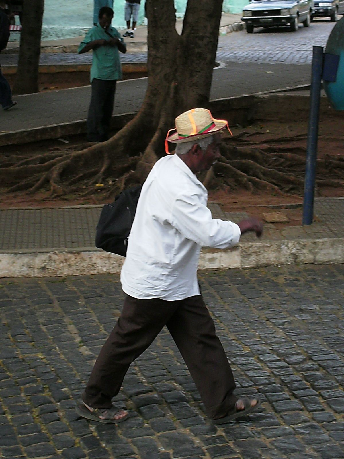 Típico romeiro de Bom Jesus da Lapa (Bahia)